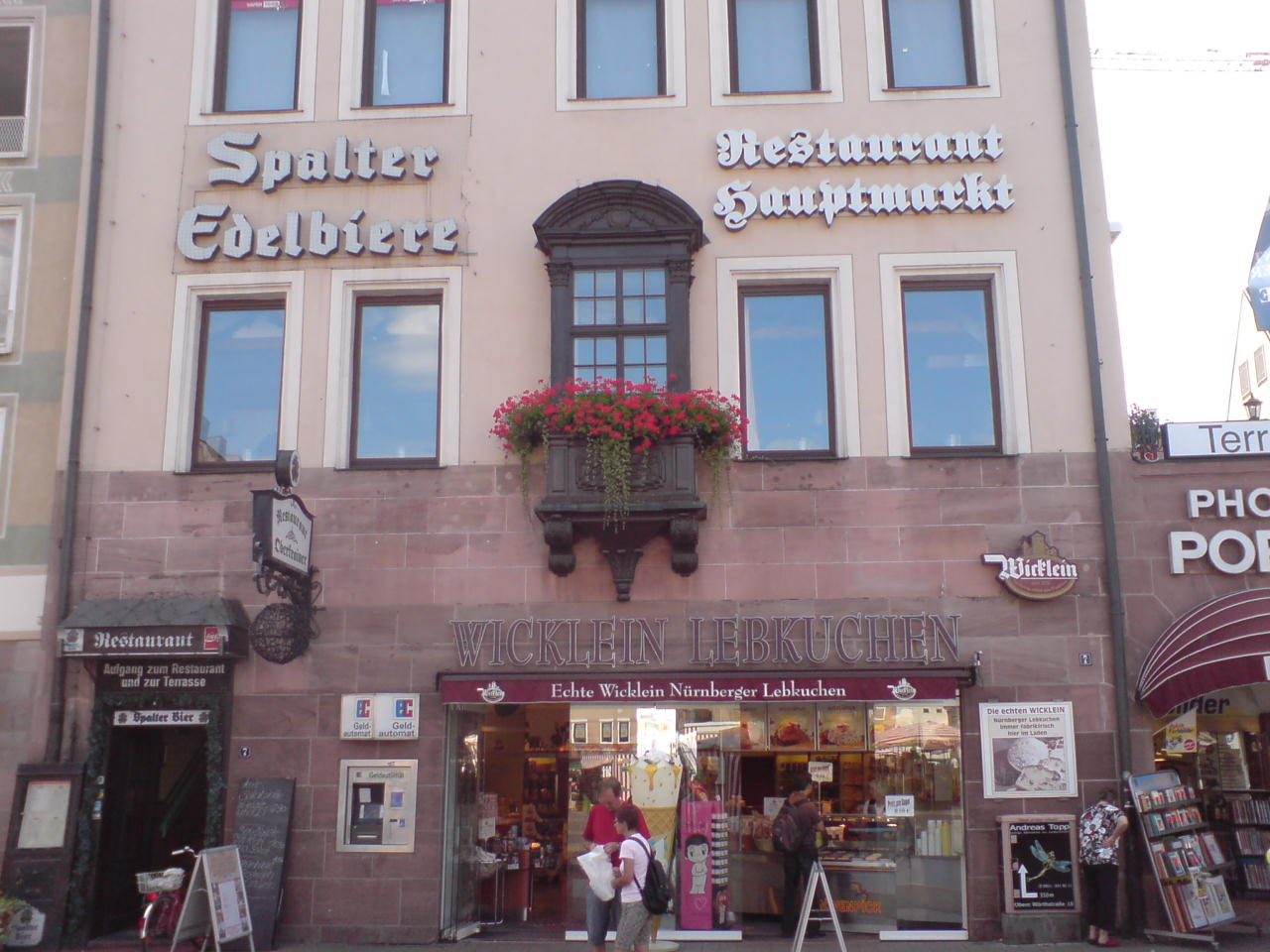 Ein Lebkuchen-Laden in Nürnberg